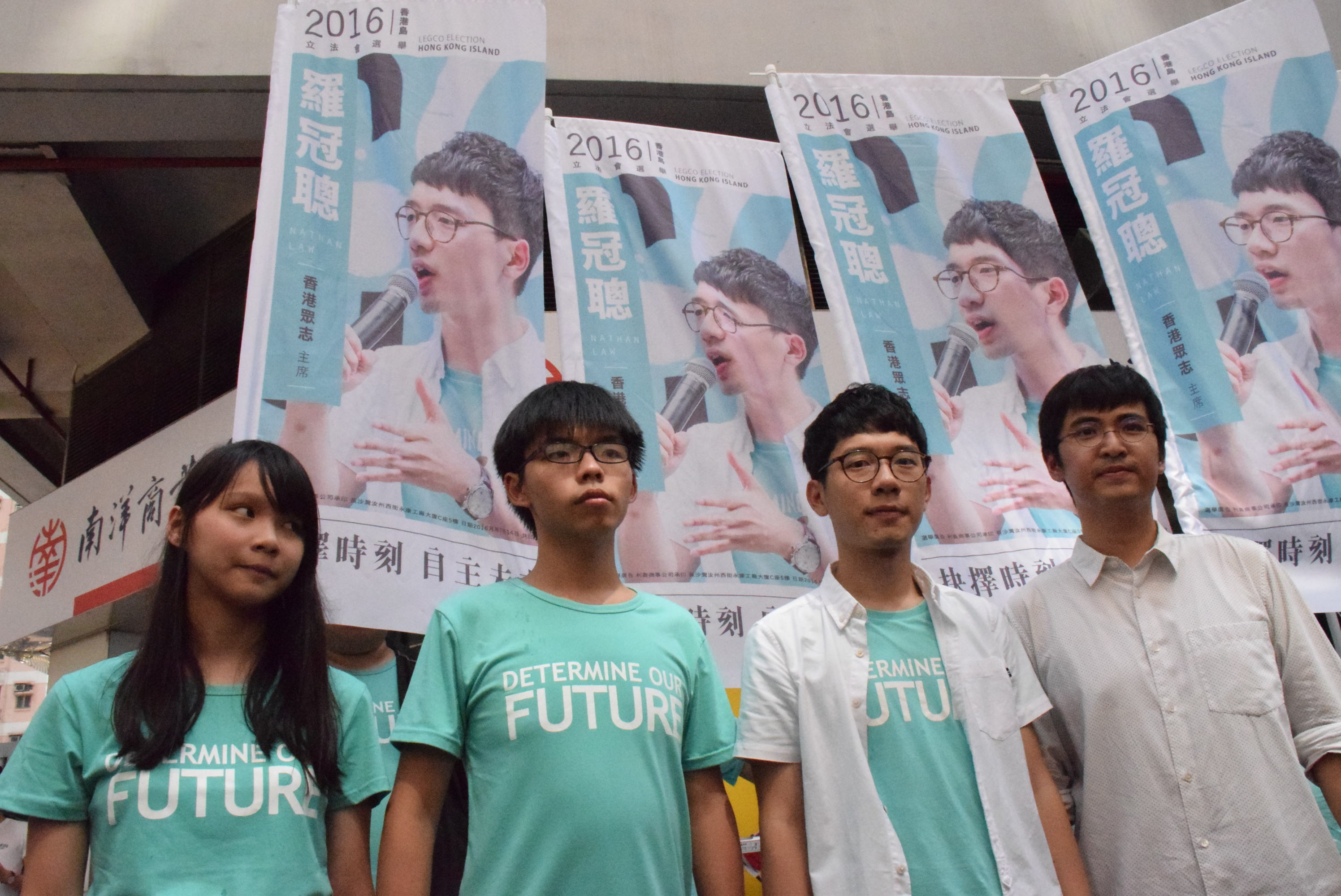 香港眾志立法會選舉香港島參選人羅冠聰(右二)。（美國之音湯惠芸攝）